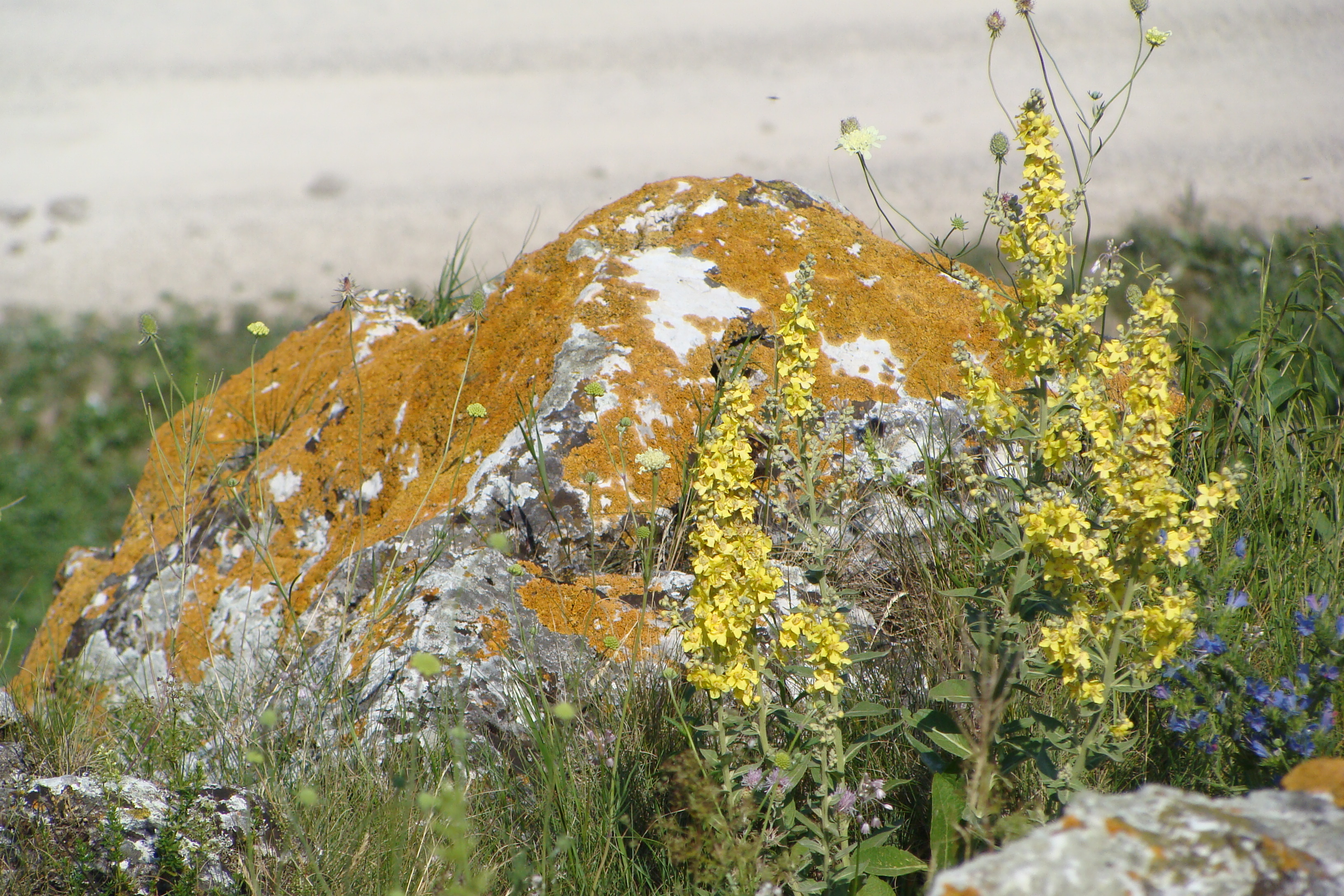 A-038